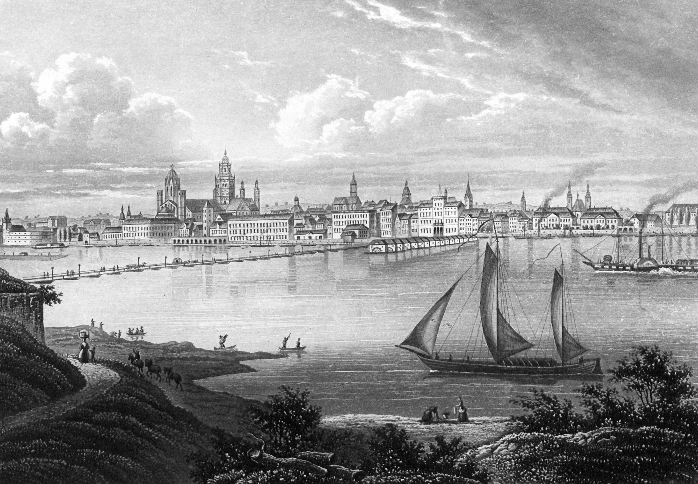 Mainz, Ansicht um 1840